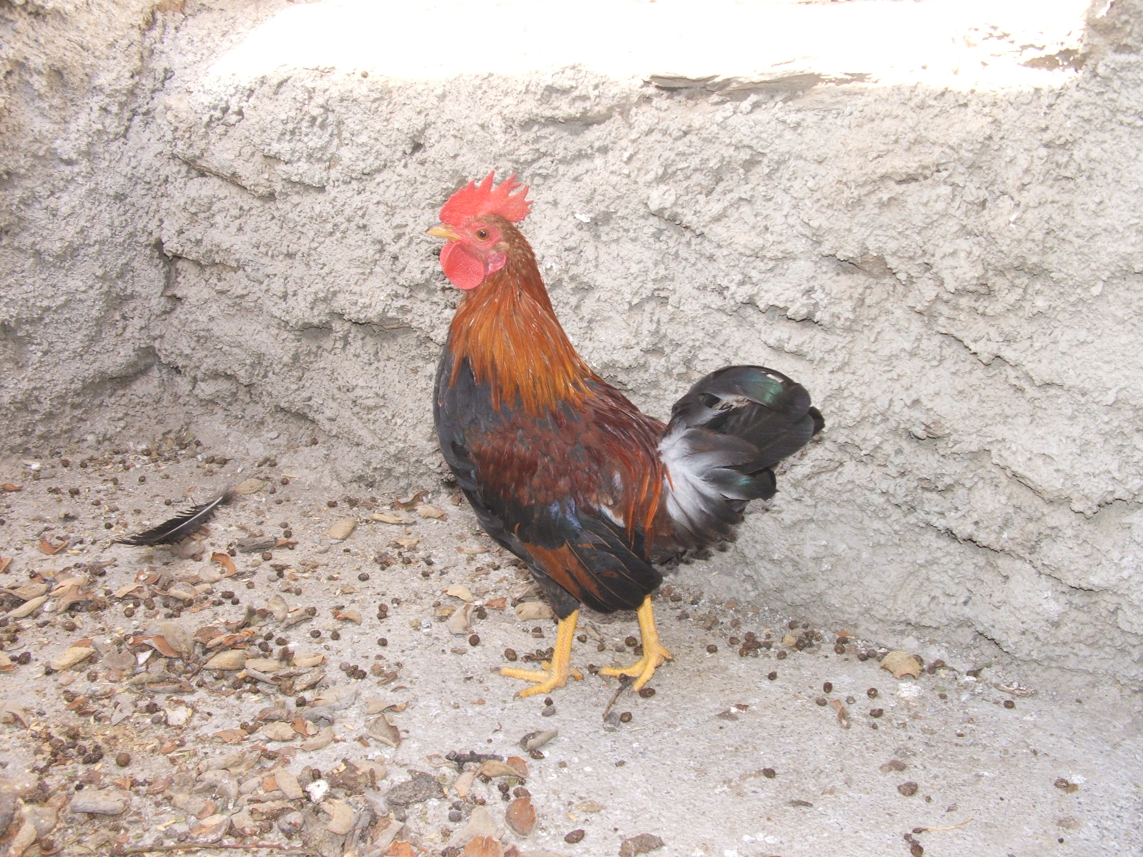 Un gallo minino, una raza raza agresiva de la especie Gallus gallus.